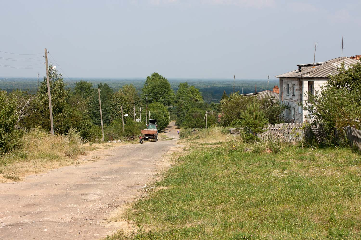 С верхневого края Перово (2010.07.25)